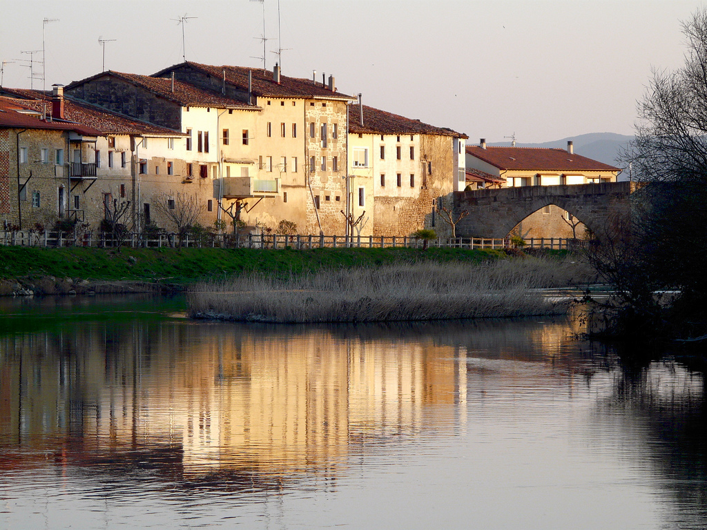 Arabako Armiñon herriaren ikuspegia.